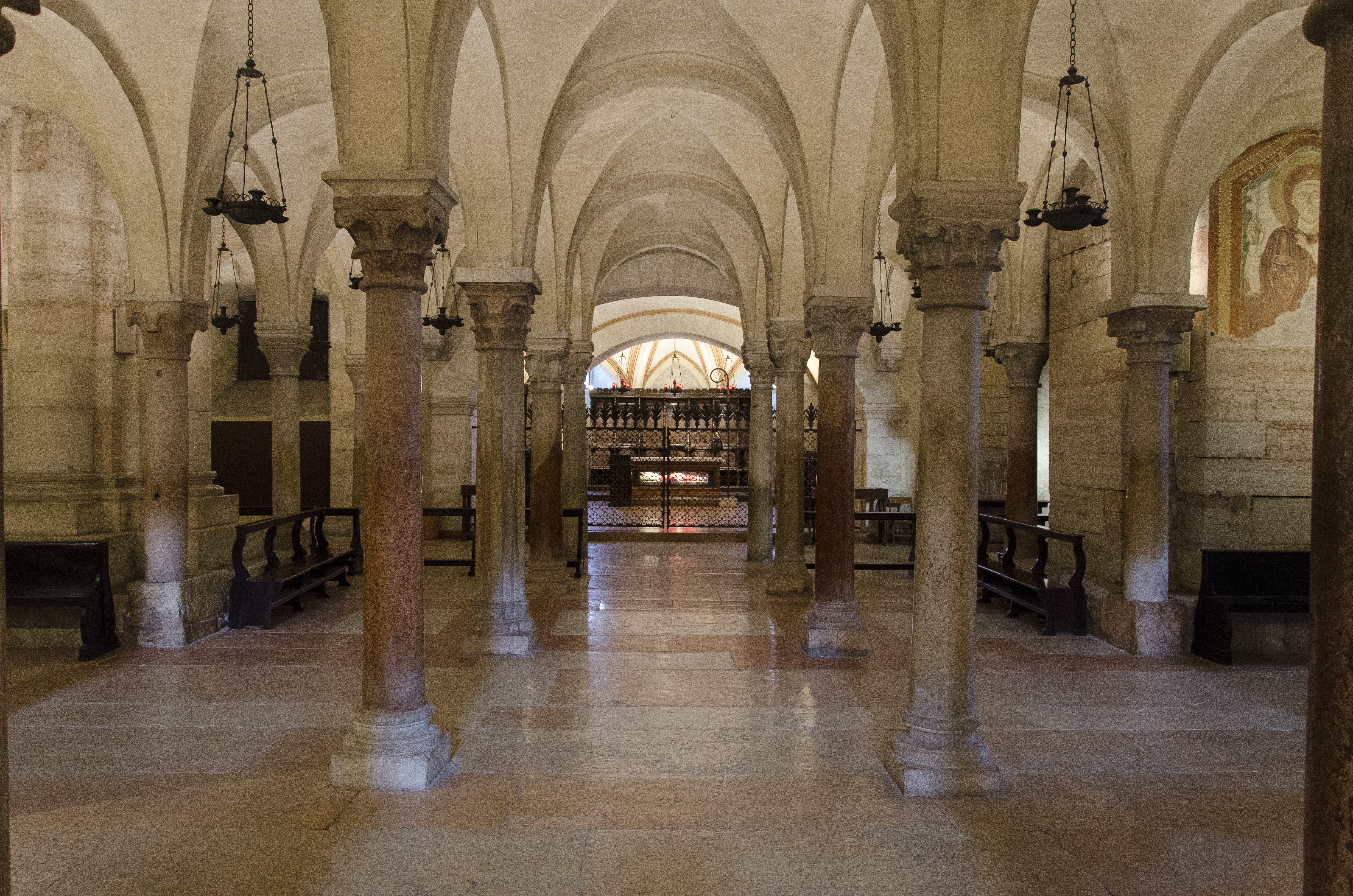 Foto degli interni della chiesa